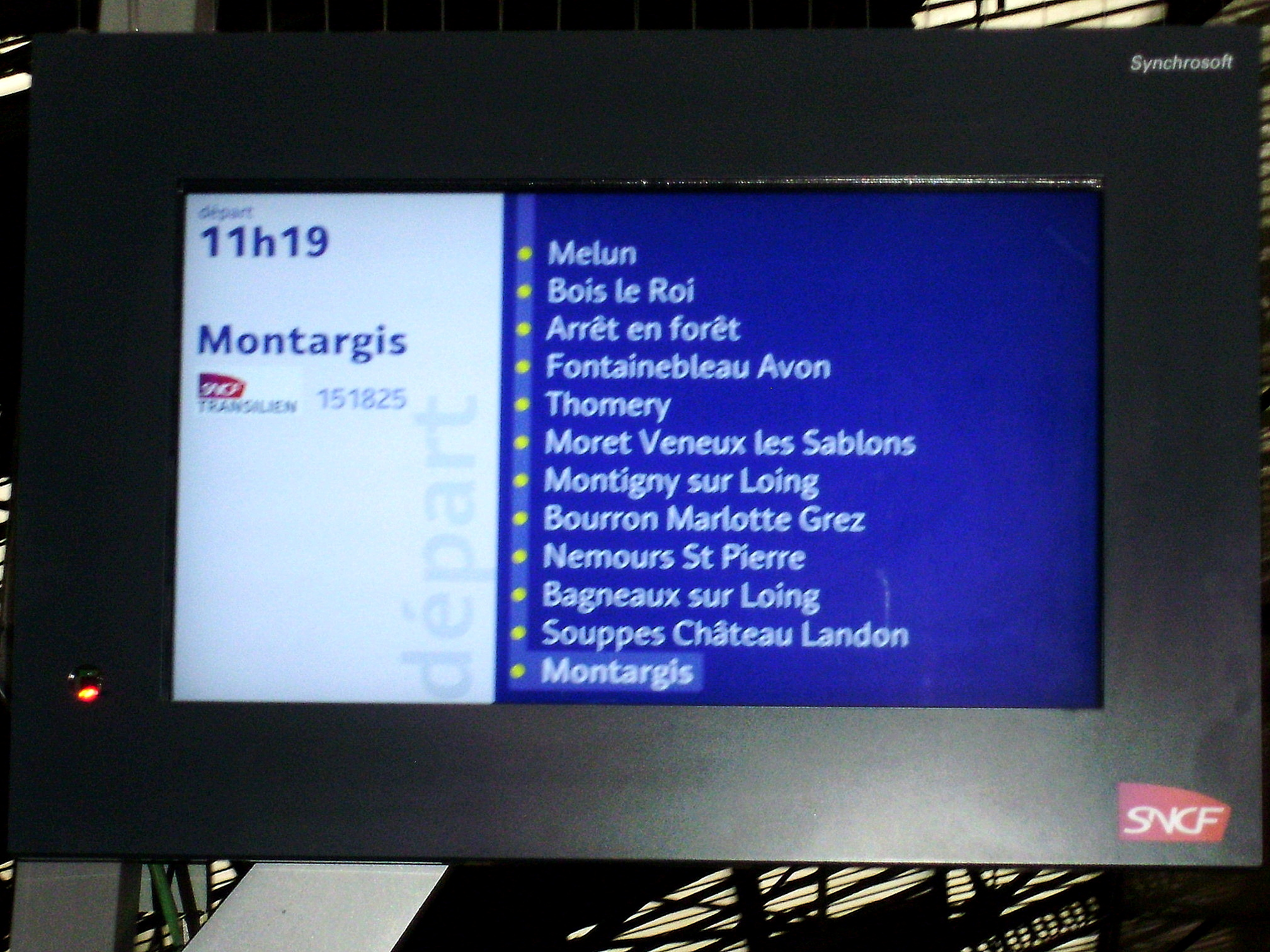 Écran de desserte affichant la liste des gares desservies par le train 151825 du 23 décembre 2012 à 11:19 au départ de Paris-Gare de Lyon à destination de Montargis. La mention « Arrêt en forêt » signale que le train marquera un arrêt à la halte de Fontainebleau-Forêt.